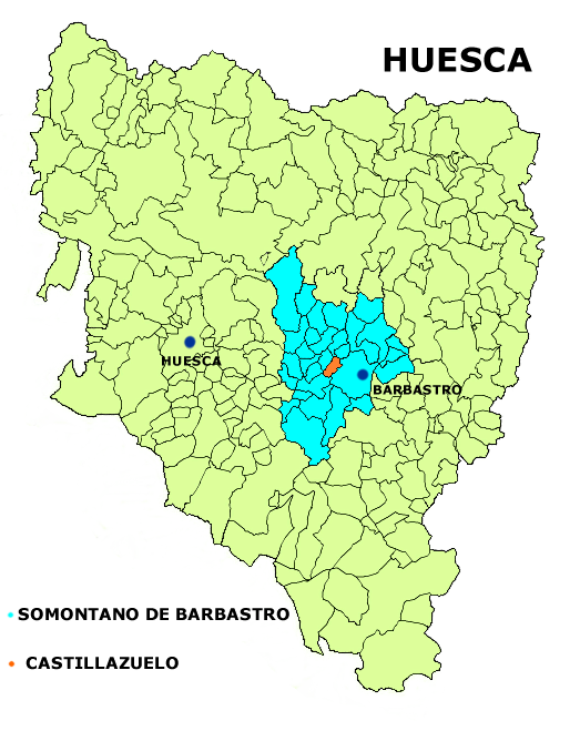 Mapa del municipio de Castillazuelo Creado el 19.12.2005 por Dionisio en base a Image:Huesca municipalities.png